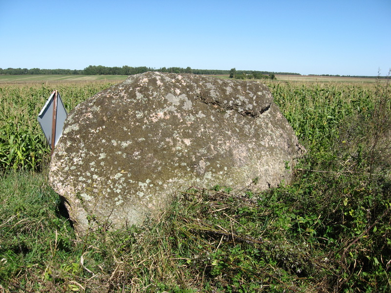 «Будрэвічаў камень» воранаўскі. Рэмзы